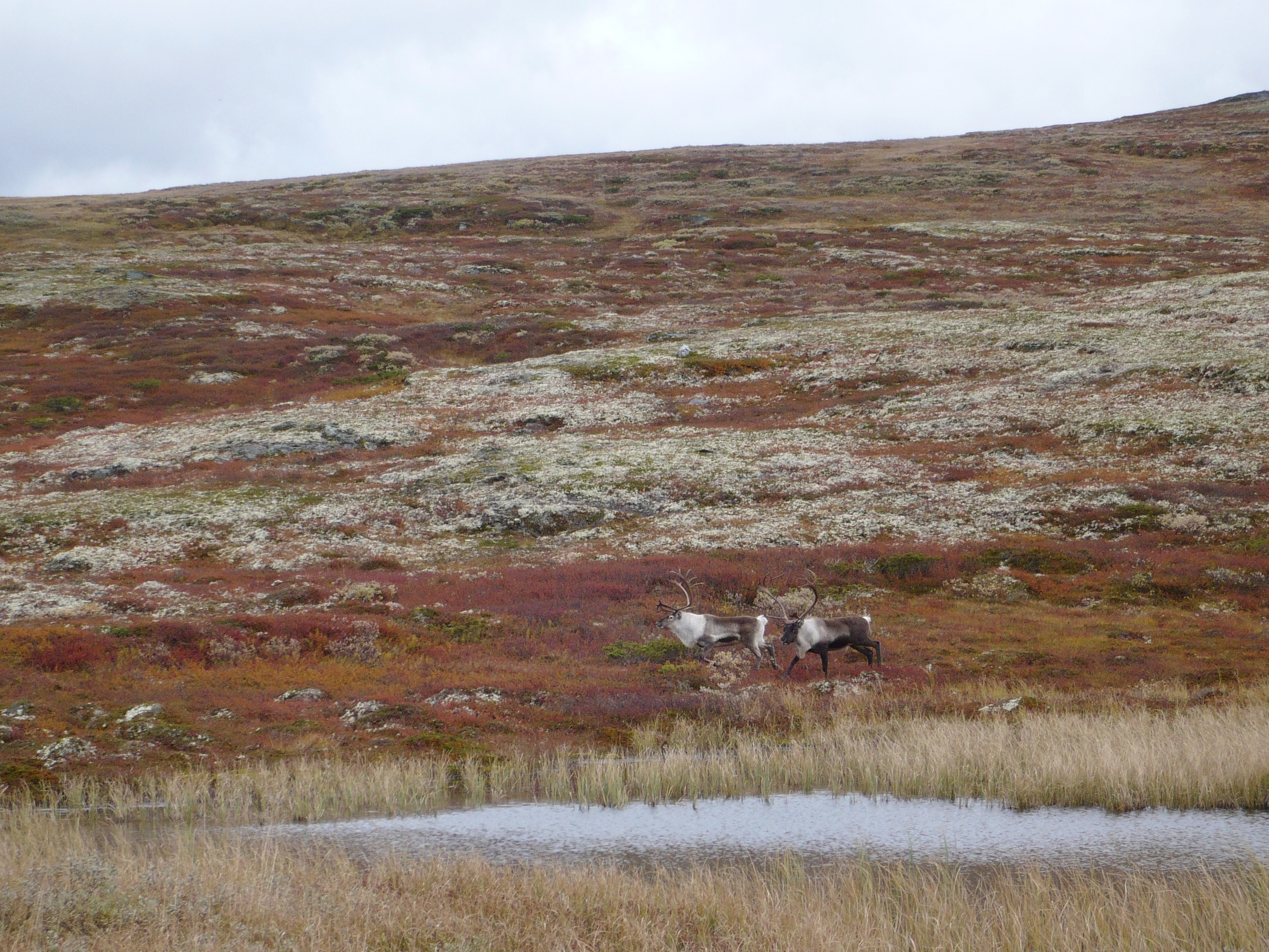 To storbukker i nærheten av Gjersjøhøa, Forollhogna nasjonalpark